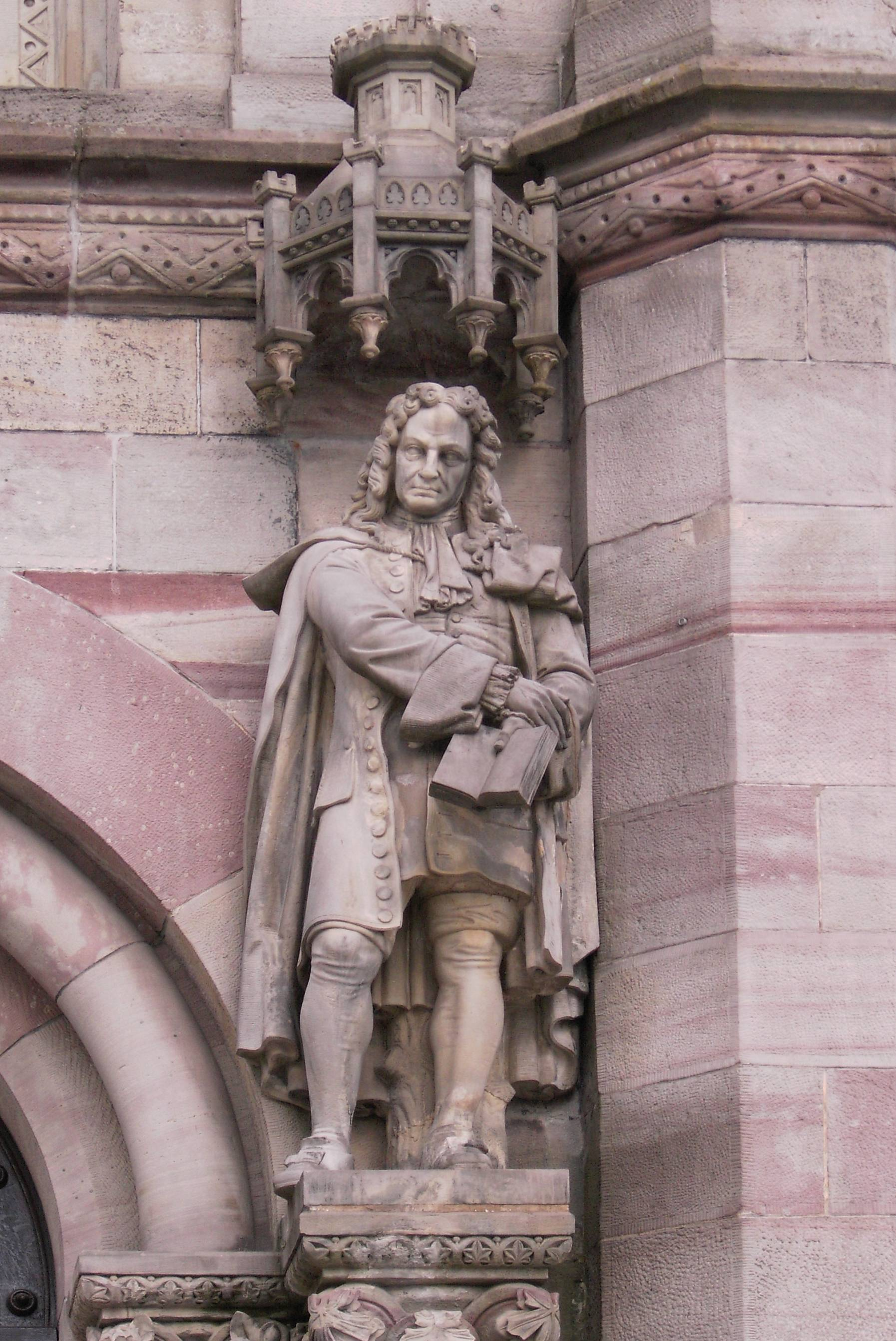 Göttingen, Auditorium, Statue of Gottfried Wilhelm Leibniz.